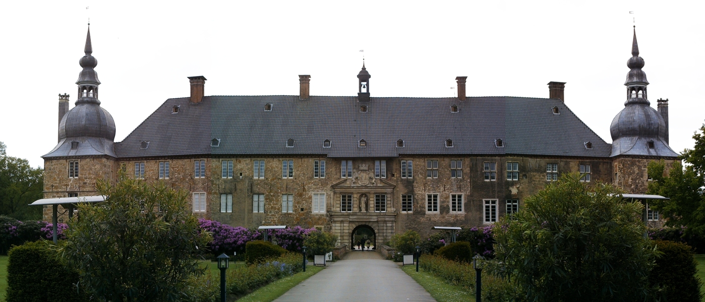 Château "Schloss Lembeck" near Dorsten, Germany.